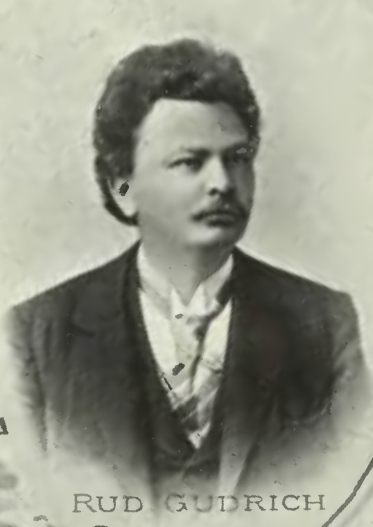 Portrét – Rudolf Gudrich (1862 - 1937), Český učitel a politik.